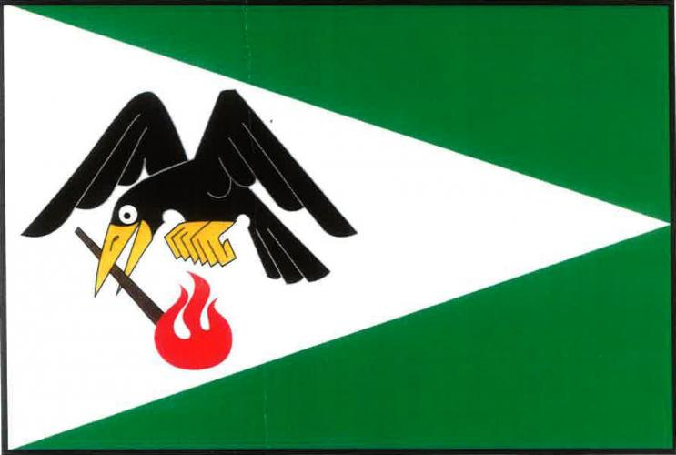 vlajka Poběžovice u Přelouče